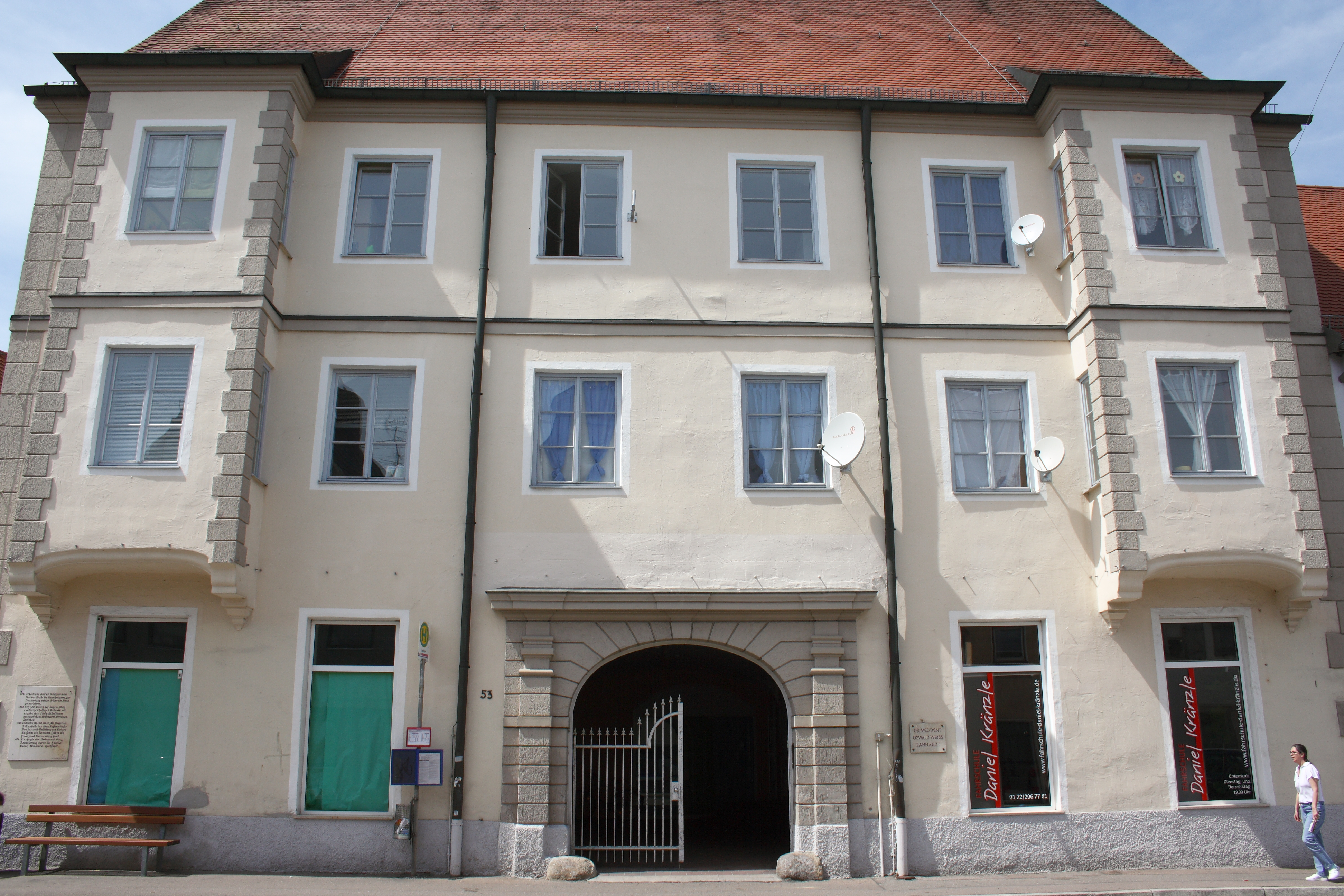 Ehemaliger Kaisheimer Kasten in Lauingen im Landkreis Dillingen an der Donau (Bayern), Herzog-Georg-Straße 53